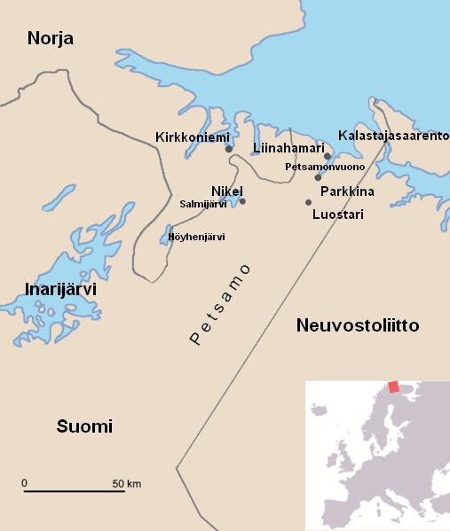 Map from Petsamo